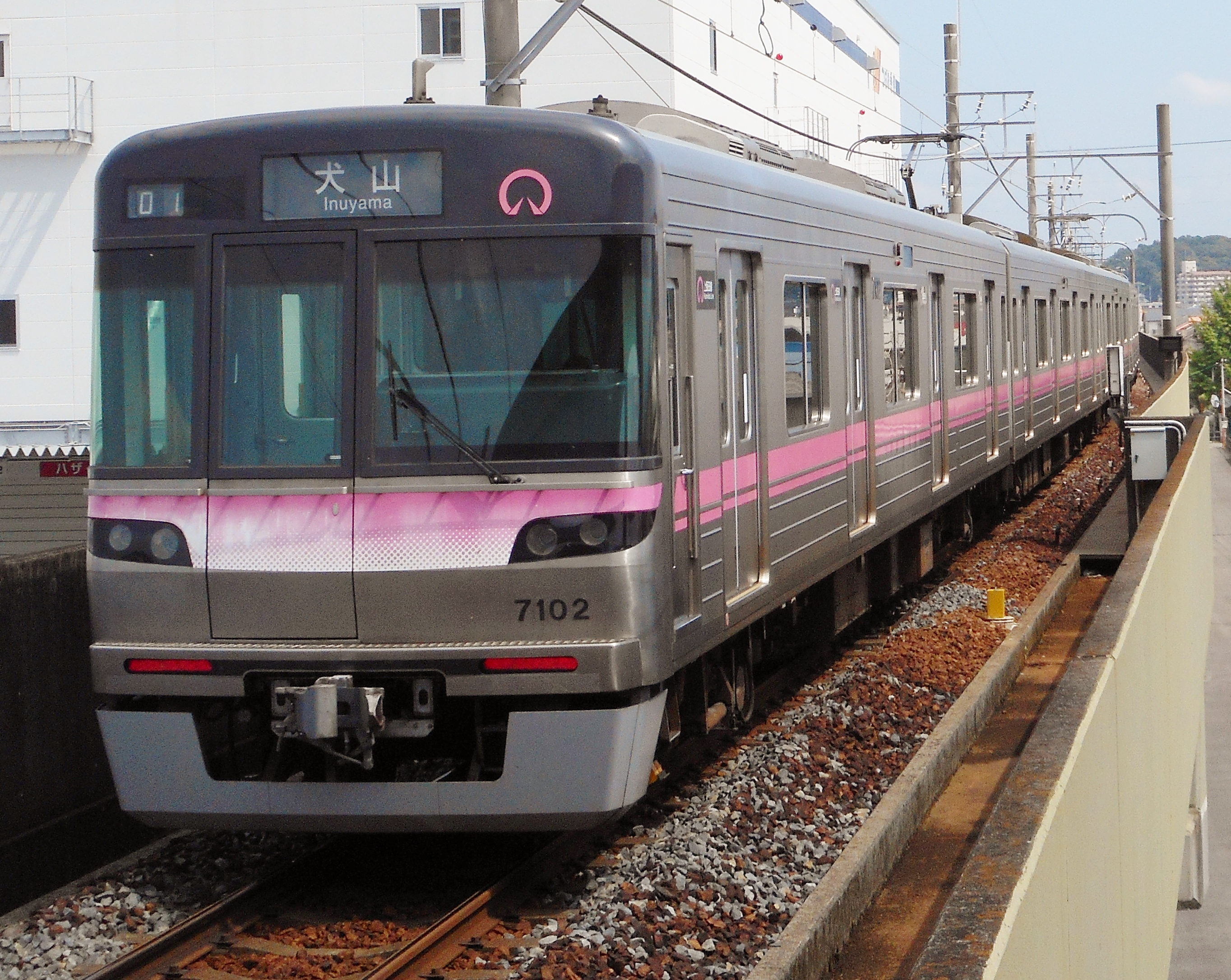 名鉄小牧線の小牧原駅で撮影